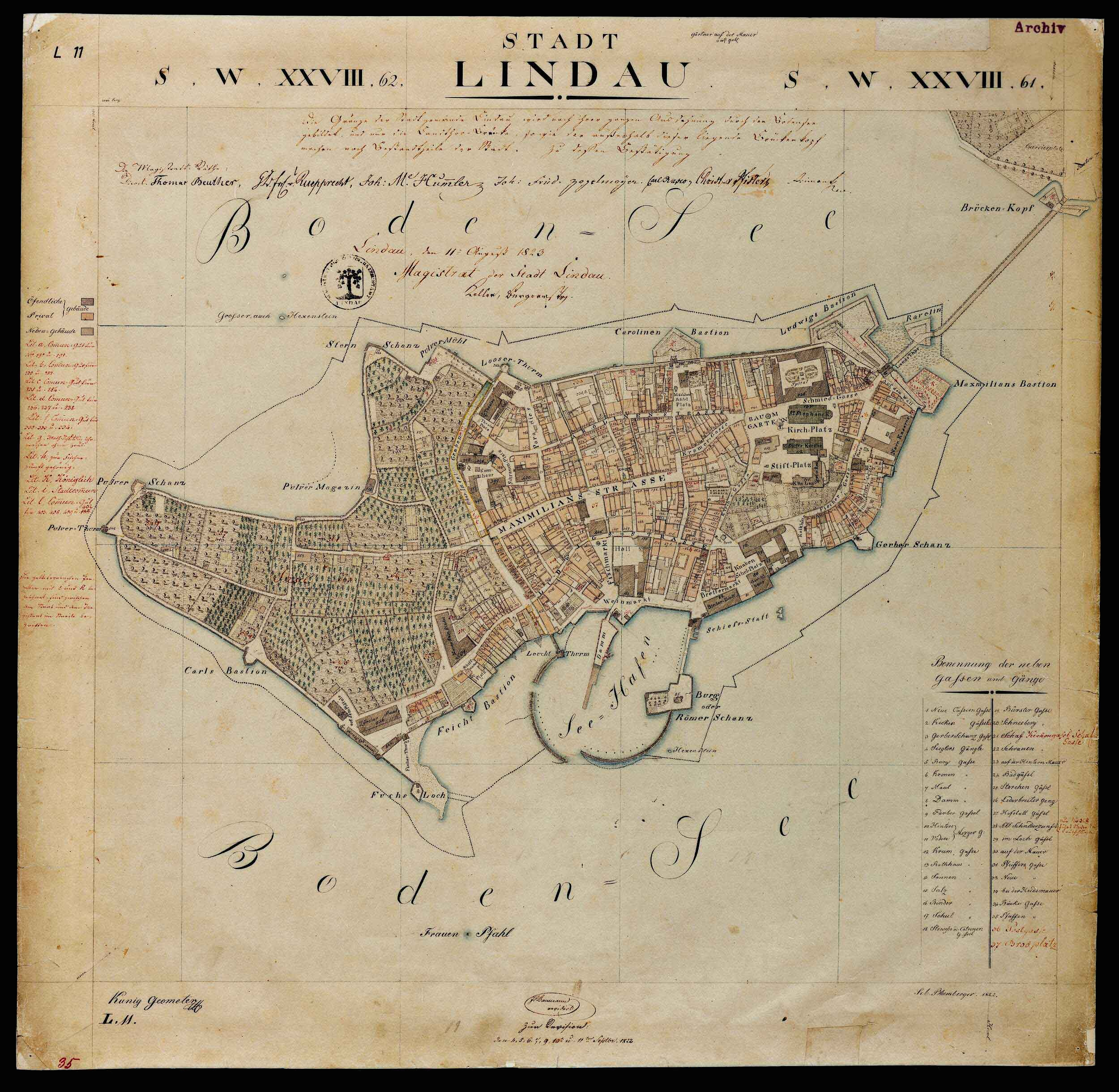 Historischer Stadtplan der Stadt (Insel) Lindau